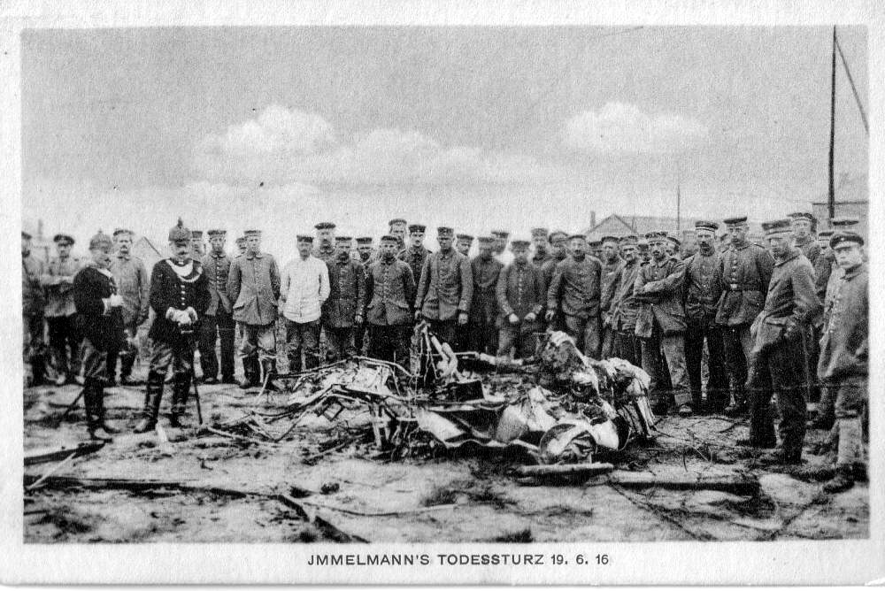 19. Juni 1916. Wrack von Immelmanns Flugzeug am Tag nach dem Absturz